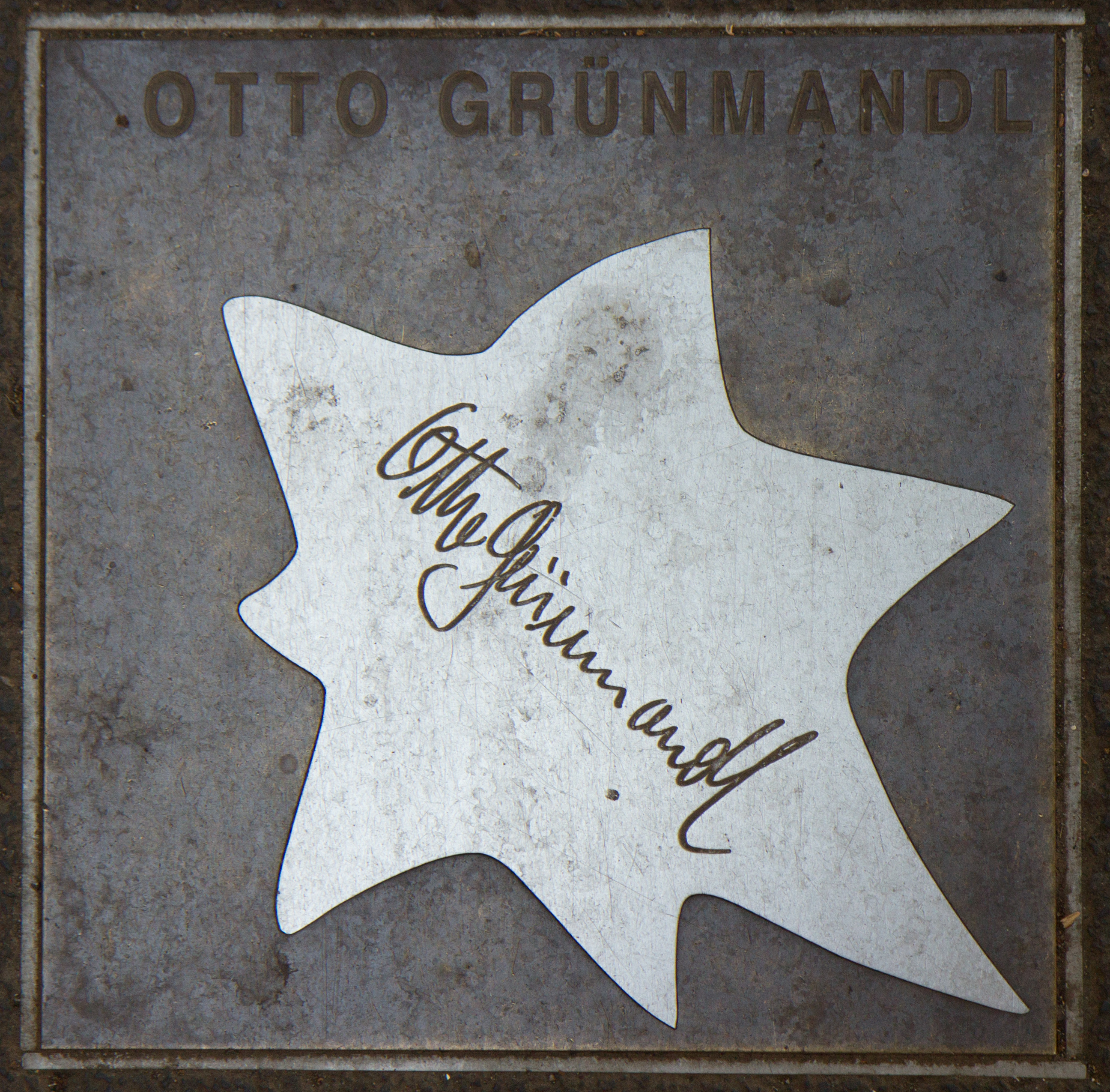 Sterne der Satire - Walk of Fame des Kabaretts in Mainz. Stern Nr. 6 von Otto Grünmandl.